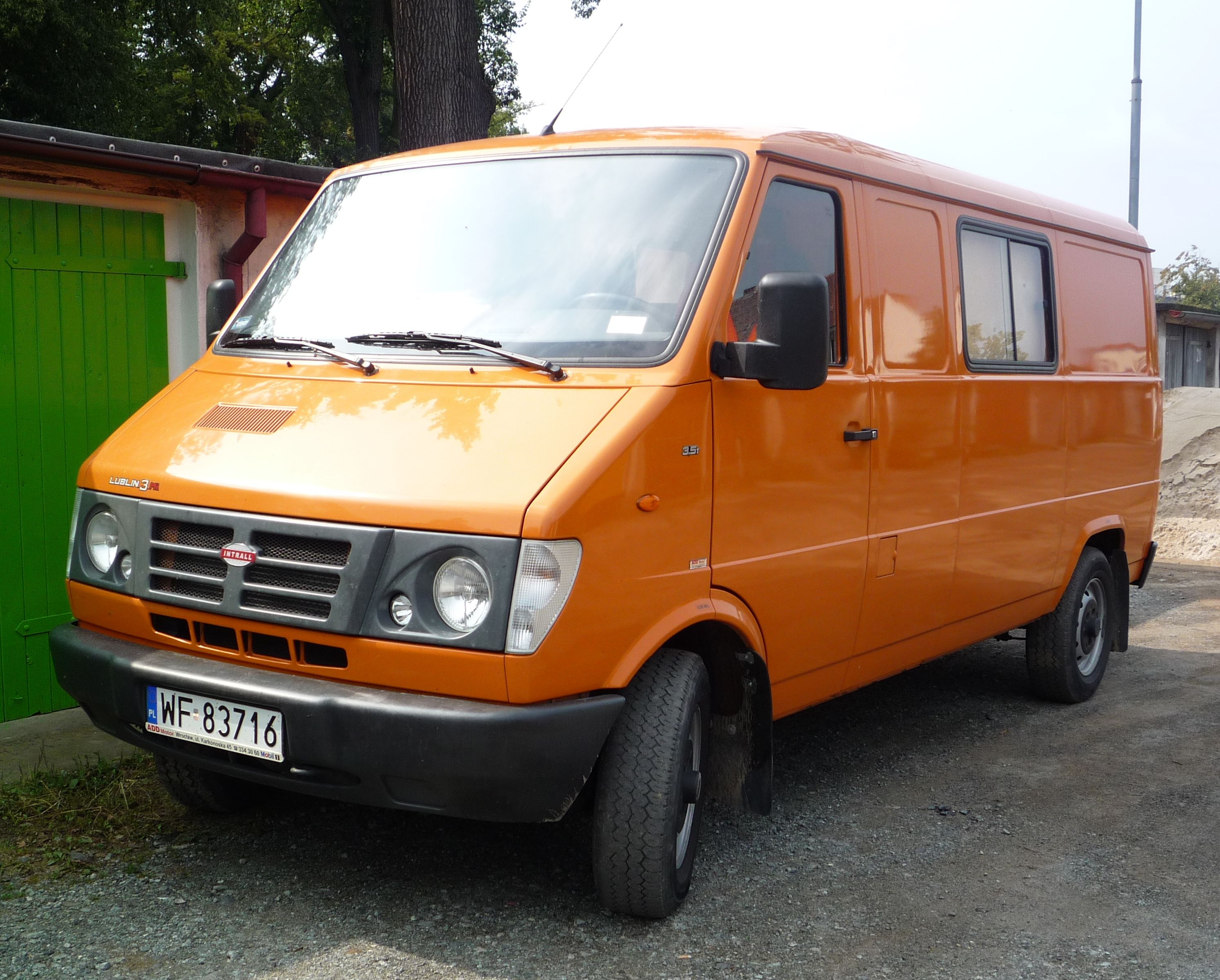 Intrall Lublin 3Mi 3524 w Słubicach.